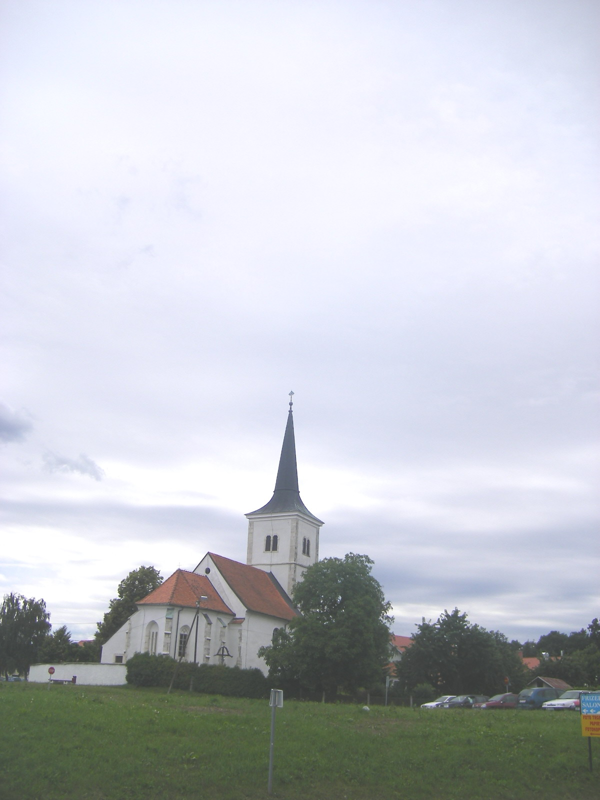 Cerkev Marijinega vnebovzetja v Brezju (Občina Maribor)